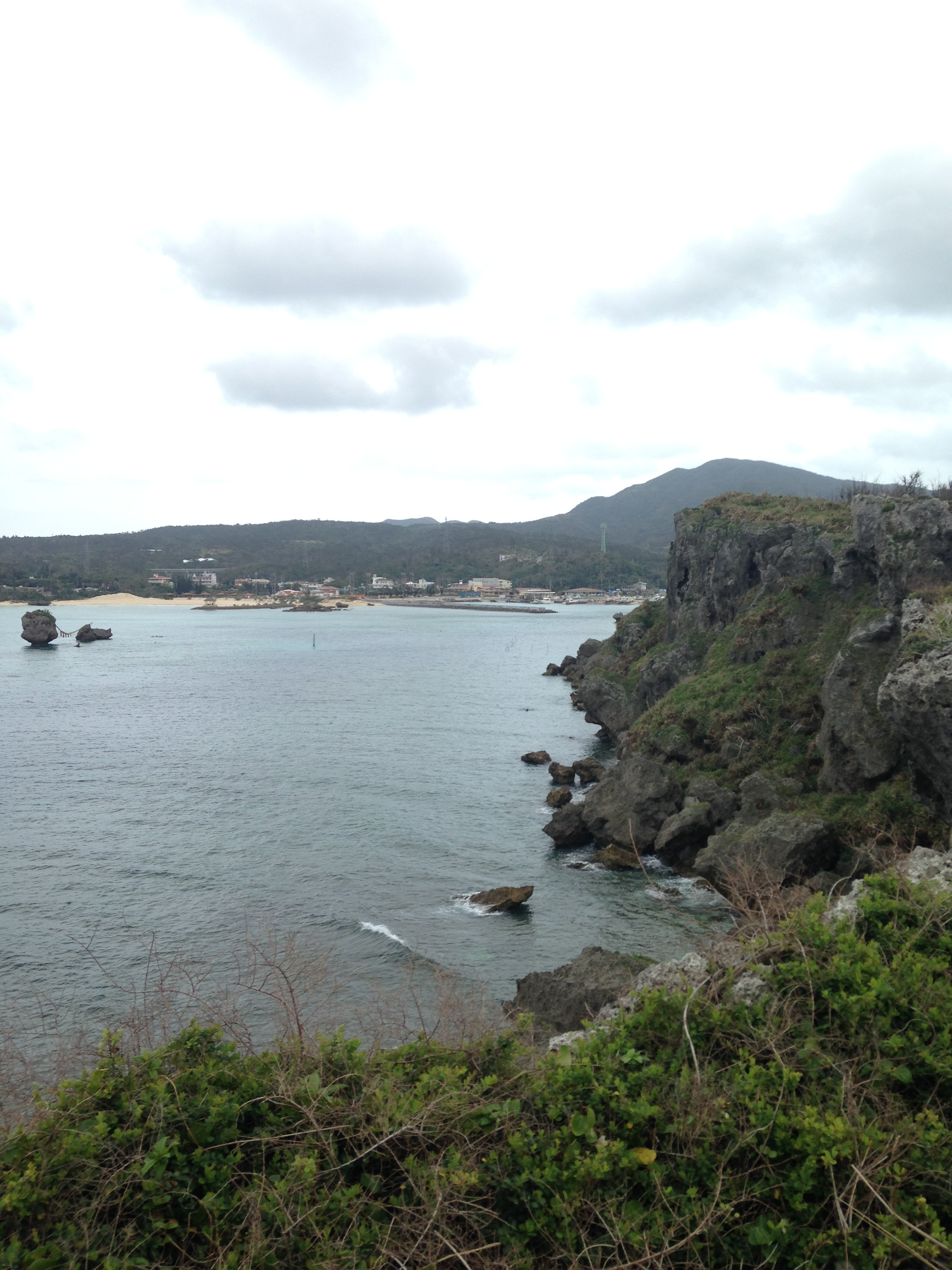 万座毛より望む恩納岳と恩納海浜公園のナビービーチ